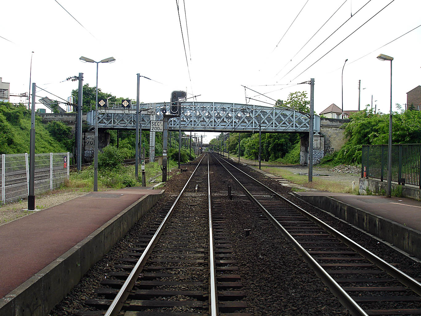 Gare de Pierrefitte - Stains (Seine-Saint-Denis).